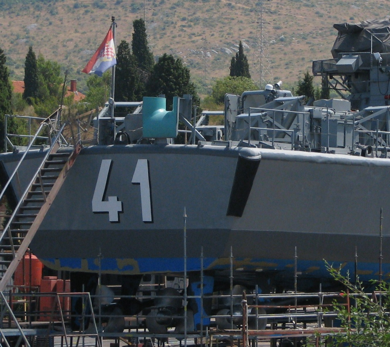 Krma i brodski vijci na RTOP-41 Vukovar na suhom vezu u Remontnom brodogradilištu Šibenik